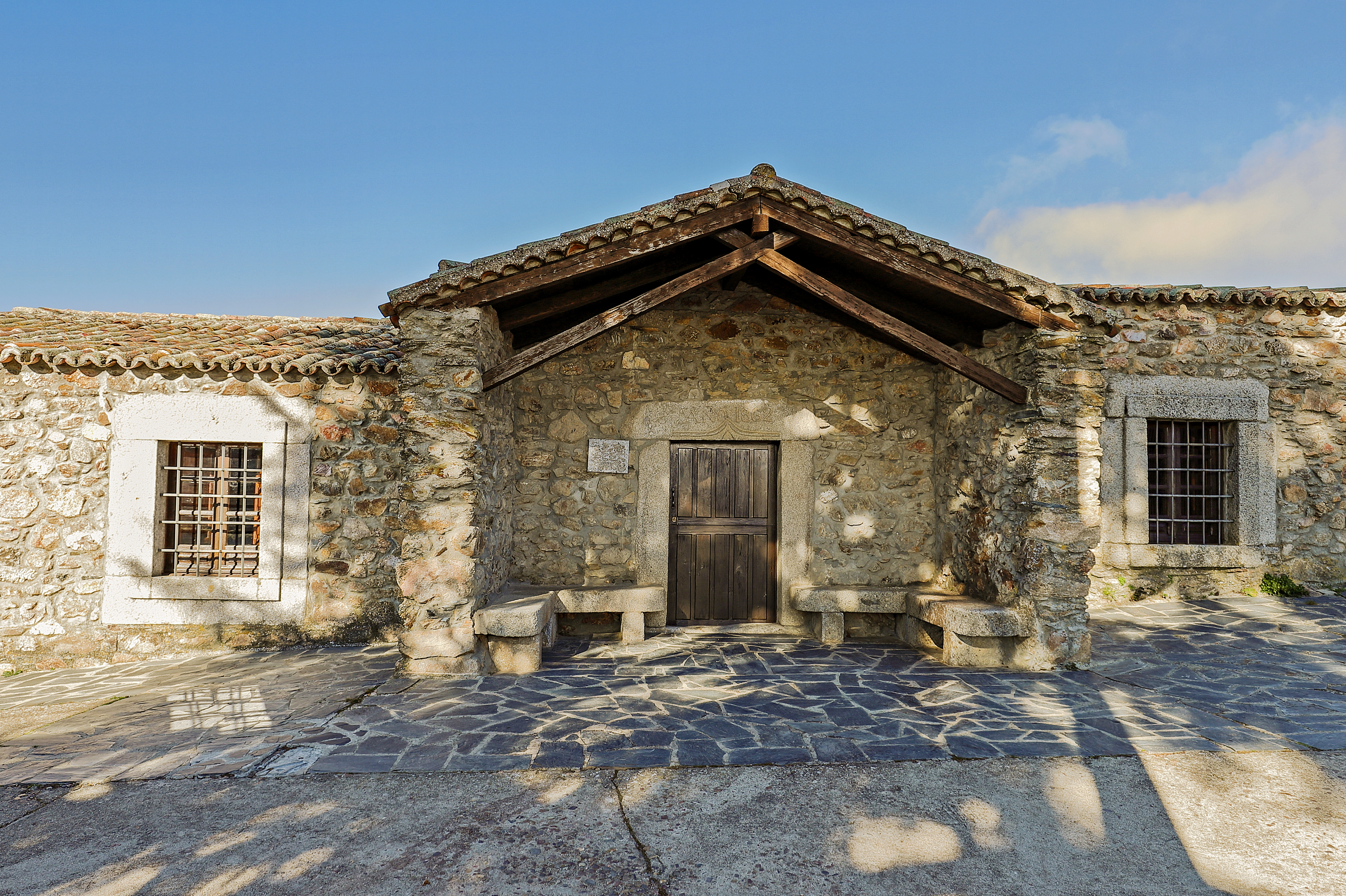 Frades de la Sierra municipio de la comarca de Entresierras, en la provincia de Salamanca.